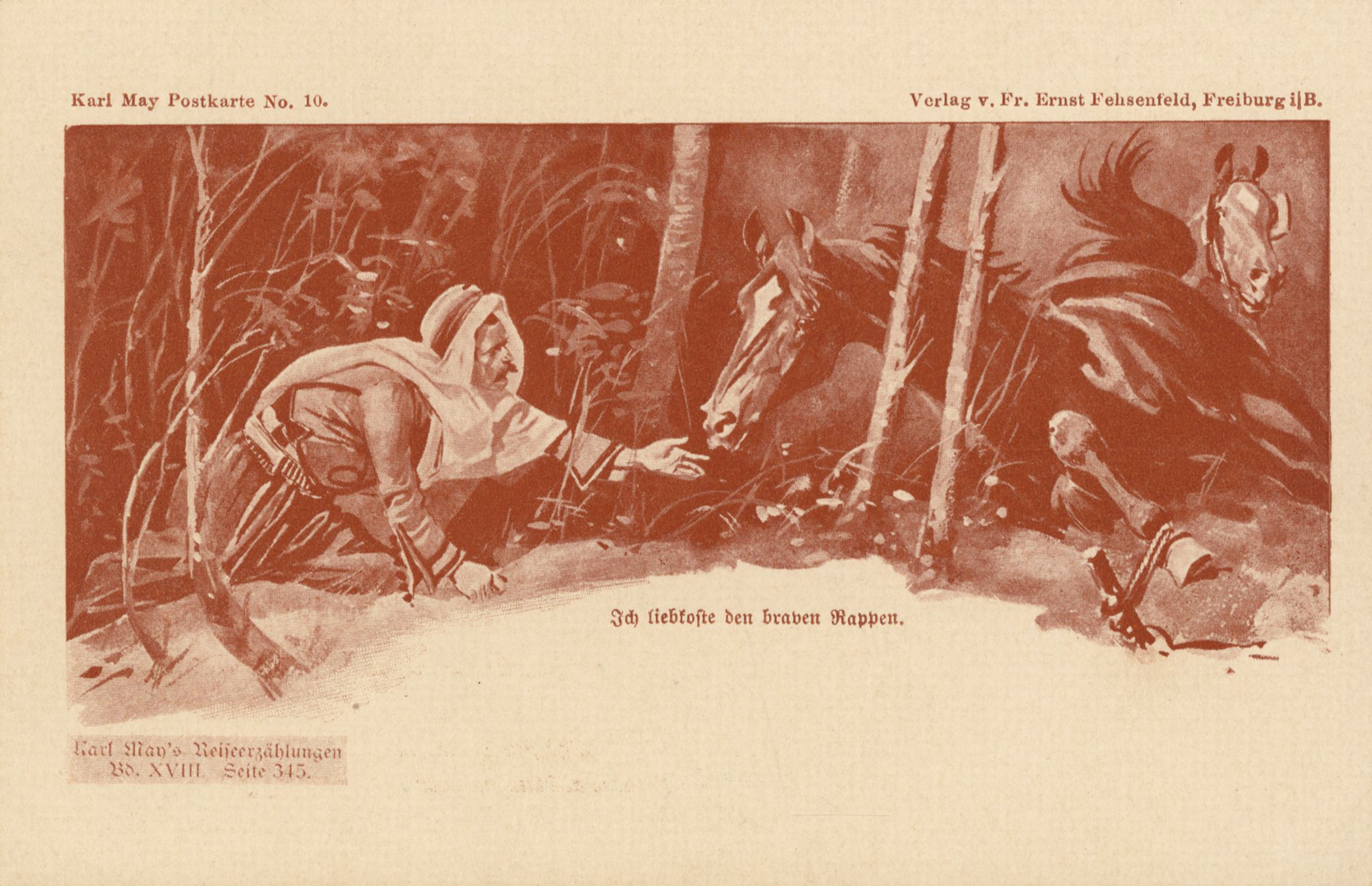 Karl May Postkarte No. 10. Ich liebkoste den braven Rappen., Karl May’s Reiseerzählungen Bd. XVIII (Im Lande des Mahdi III). Seite 345.